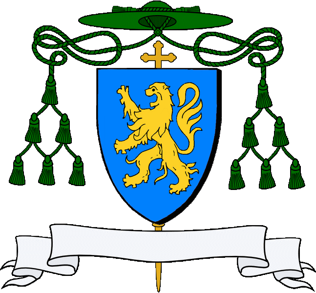 En glazur e leon kudennek en aour